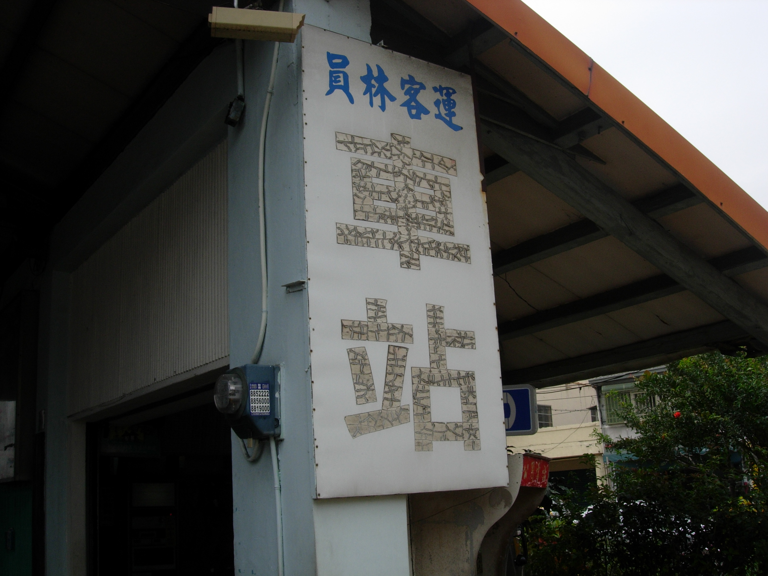 中文（台灣）: 員林客運溪湖站造型看板。